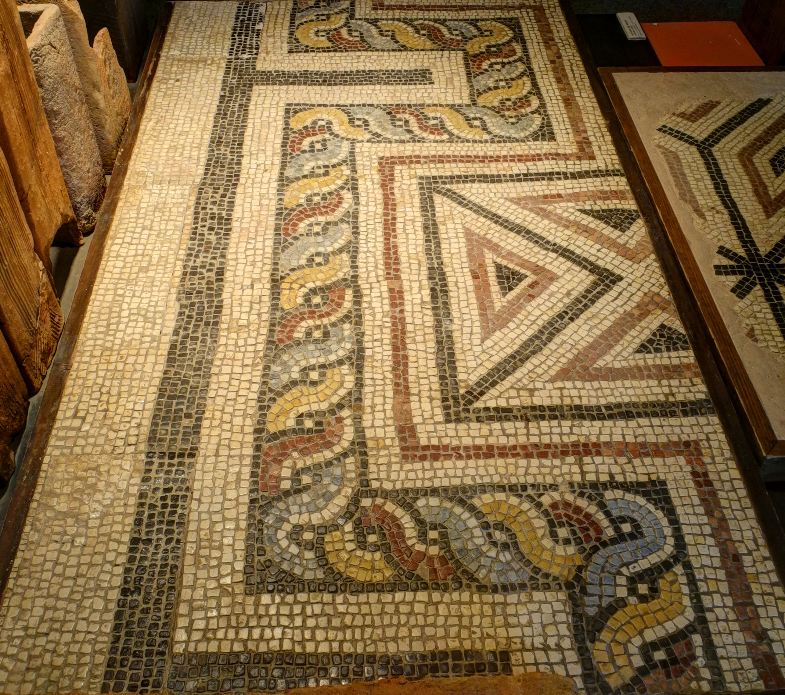 Musée d'Histoire : mosaïque sur briques d'hypocauste (HDR). Terre cuite (époque gallo-romaine), Bavillers MAHB dépôt du GDEA T 86.15.1